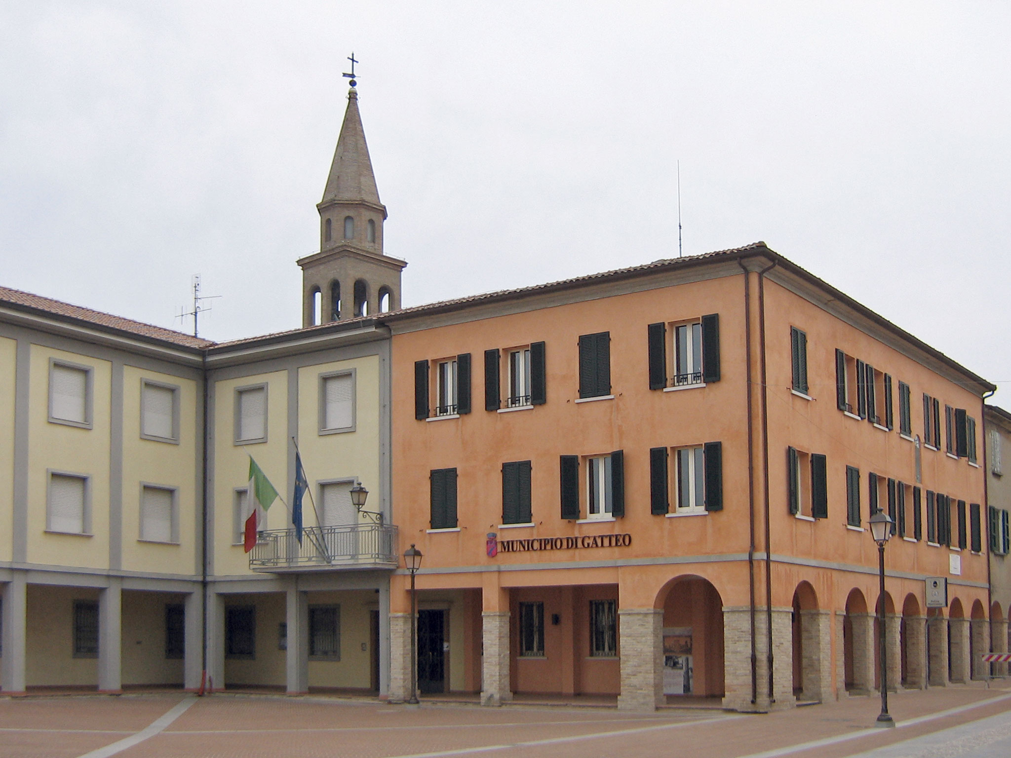 Municipio di Gatteto (FC), Italy